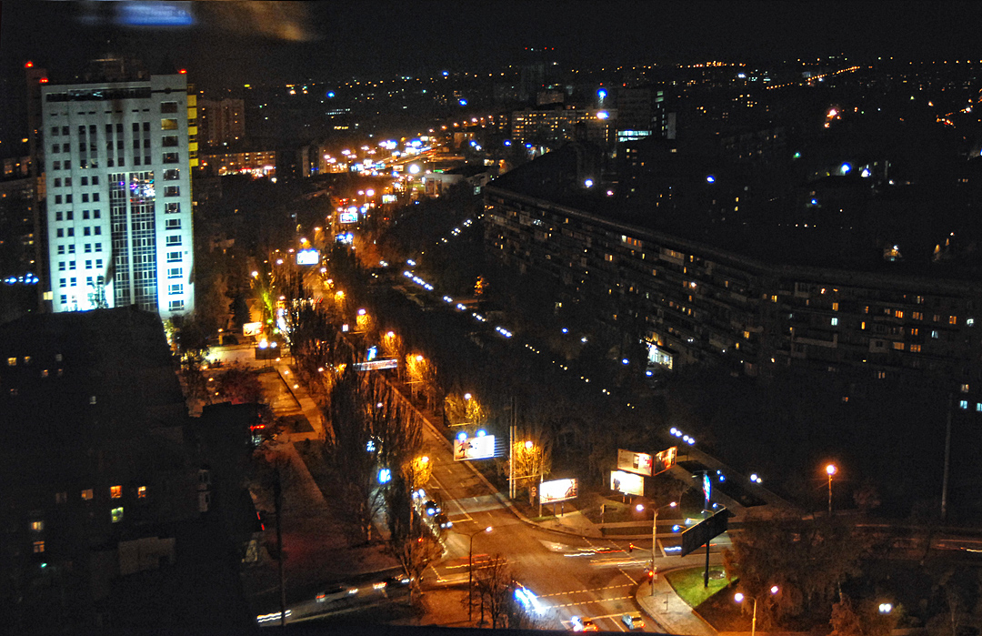 Str.Artema